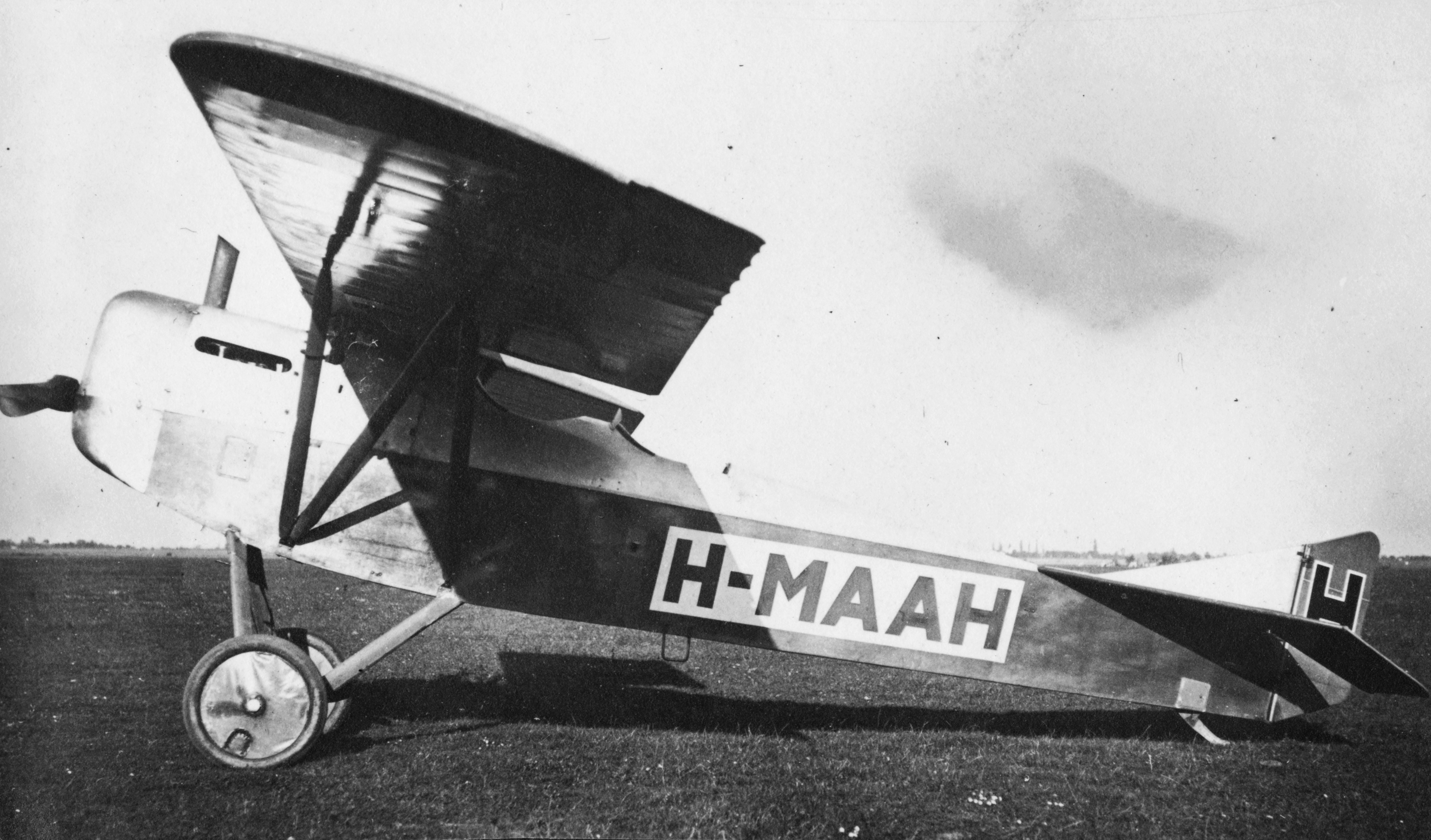 repülőtér, Oravecz II. típusú iskolarepülőgép. Location: Hungary, Szombathely Tags: Royal Hungarian Air Force, airplane, transport, airport, Hungarian brand Title: repülőtér, Oravecz II. típusú iskolarepülőgép.